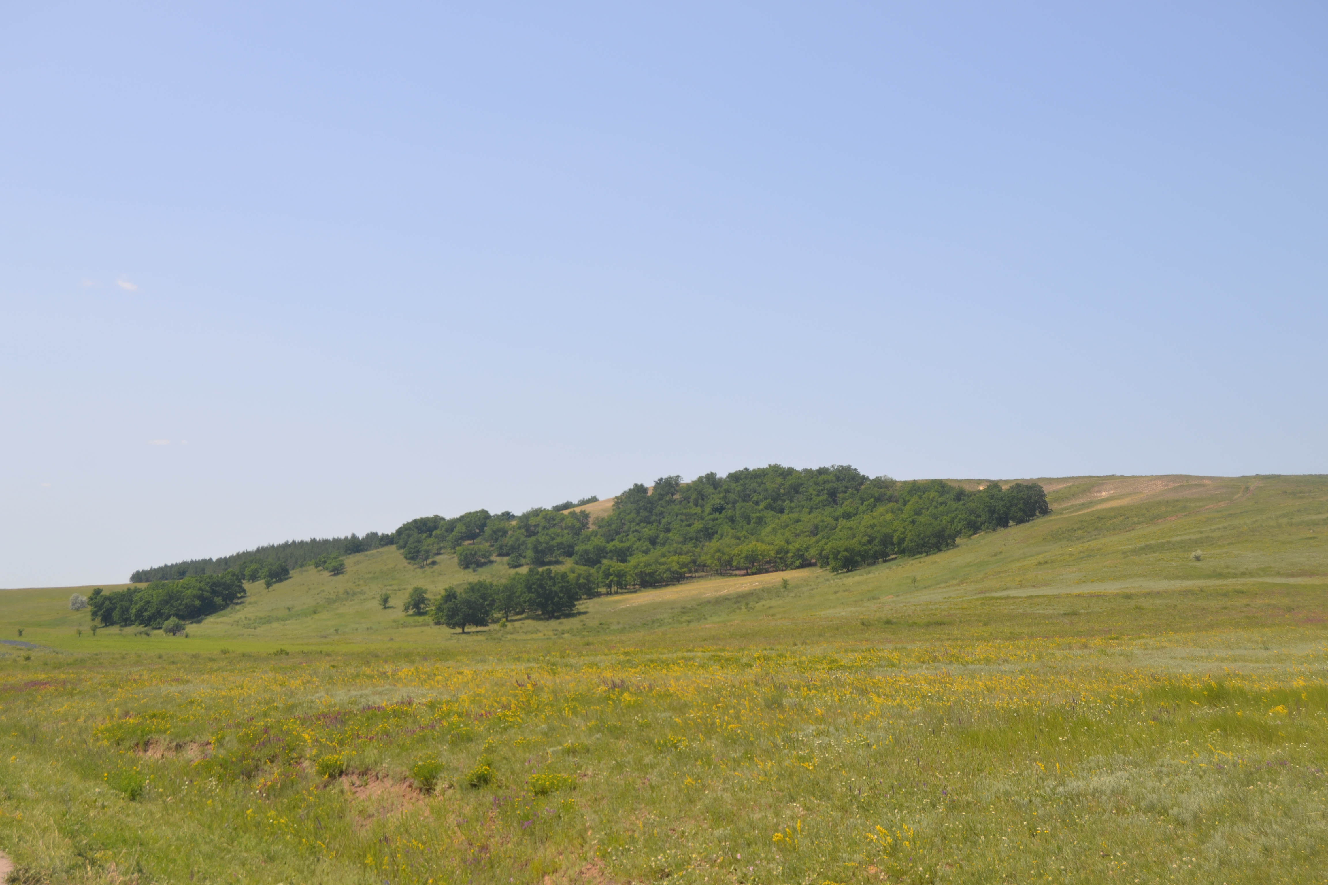 Изображение деревни. Окрестности (Быковка, Саратовский район)